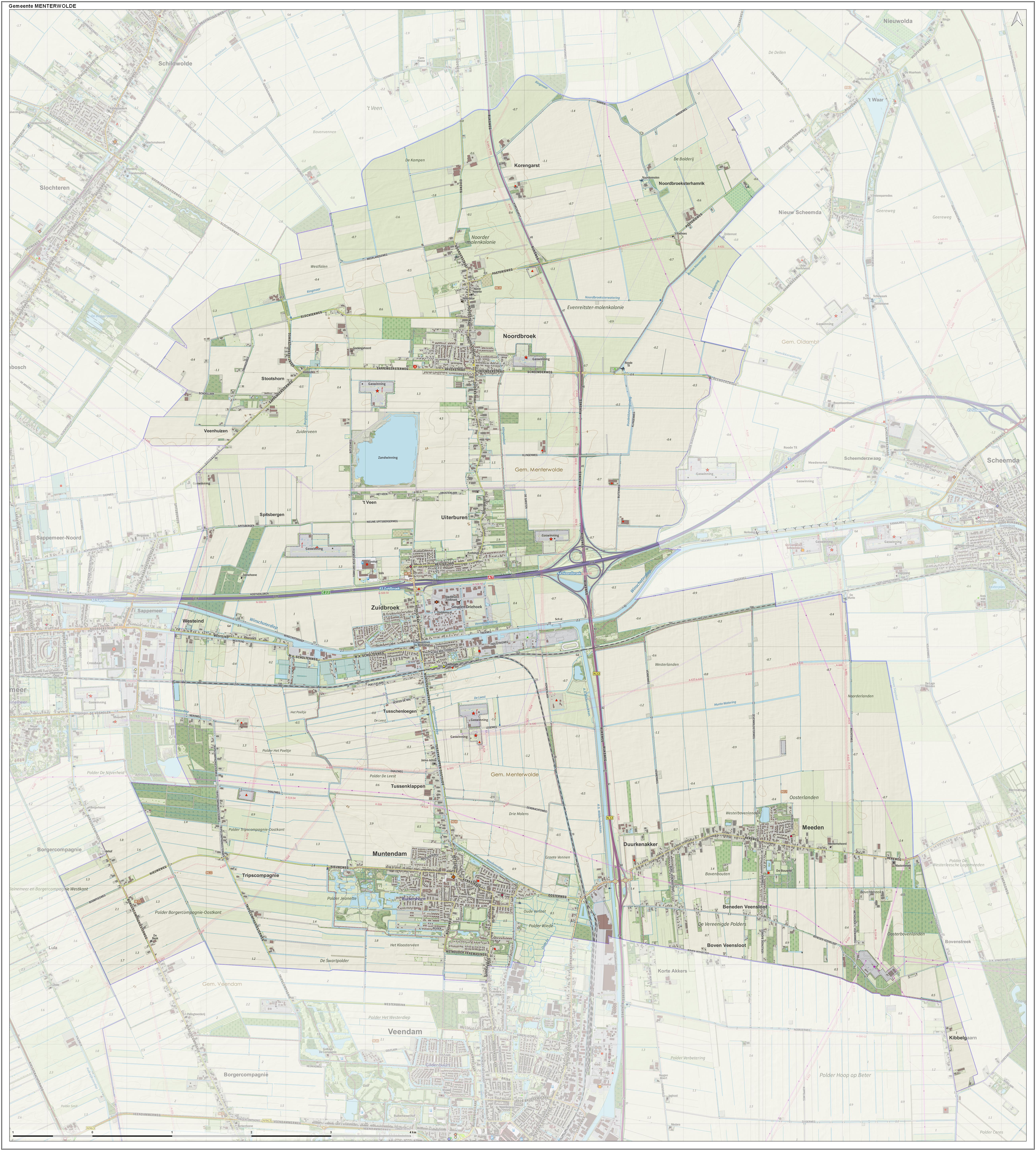 Topografische gemeentekaart. Resolutie: 400 pixels/km. Kaartbeeld samengesteld uit de open geodata van de Top10NL en Top25namen (Kadaster), Creative Commons-BY licentie. Gebouwvlakken uit open geodata BAG extract. Wegen uit de OpenStreetMap, OpenStreetMap community. Reliëfschaduw uit de Actuele Hoogtekaart AHN2. Samenstelling en kleurenschema: Jan-Willem van Aalst, met QGIS. Zie ook de Legenda.